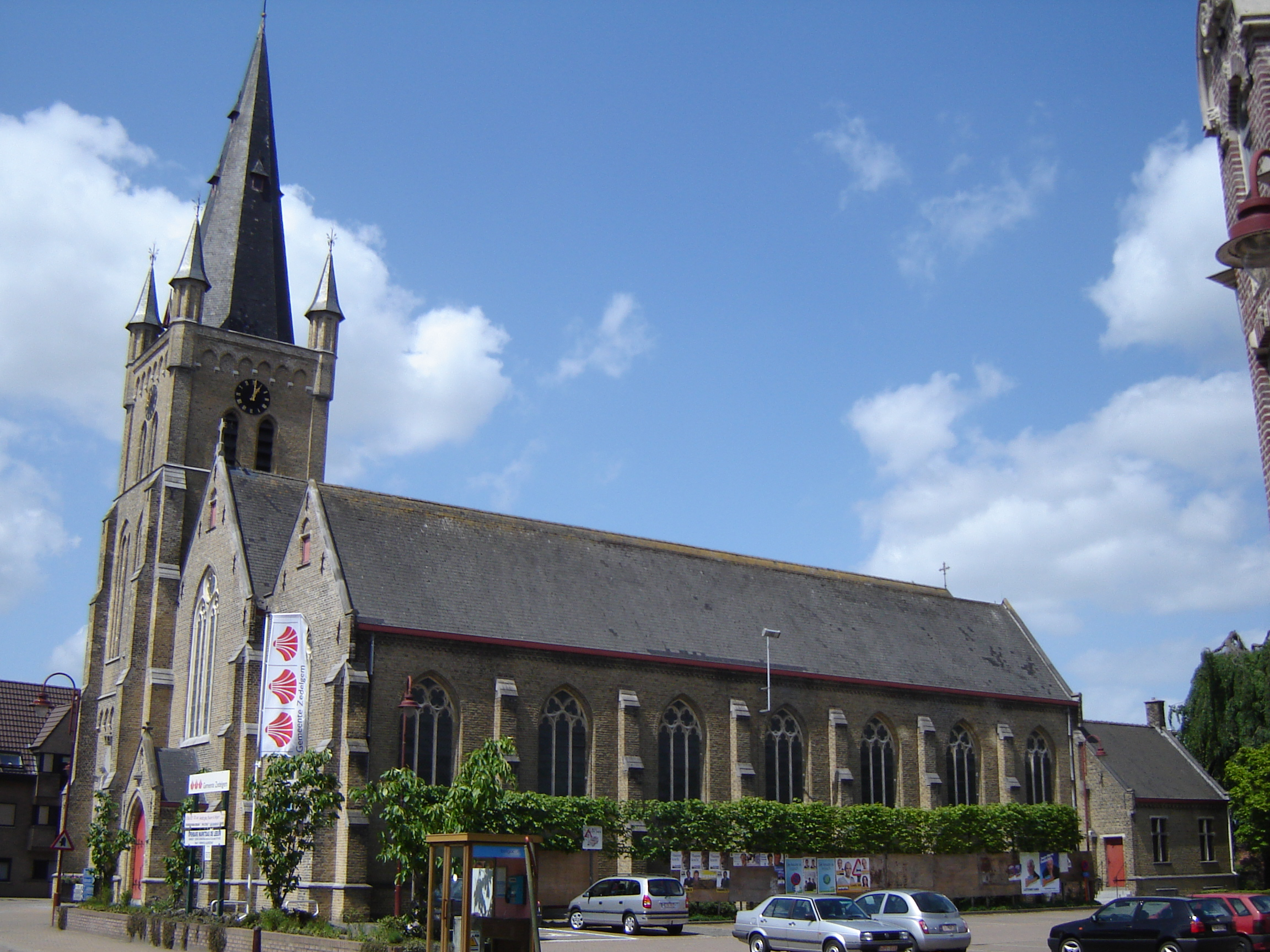 Sint-Andreaskerk en marktplein in AartrijkeChurch of Saint Andrew and market square in Aartrijke. Aartrijke, Zedelgem, West Flanders, Belgium